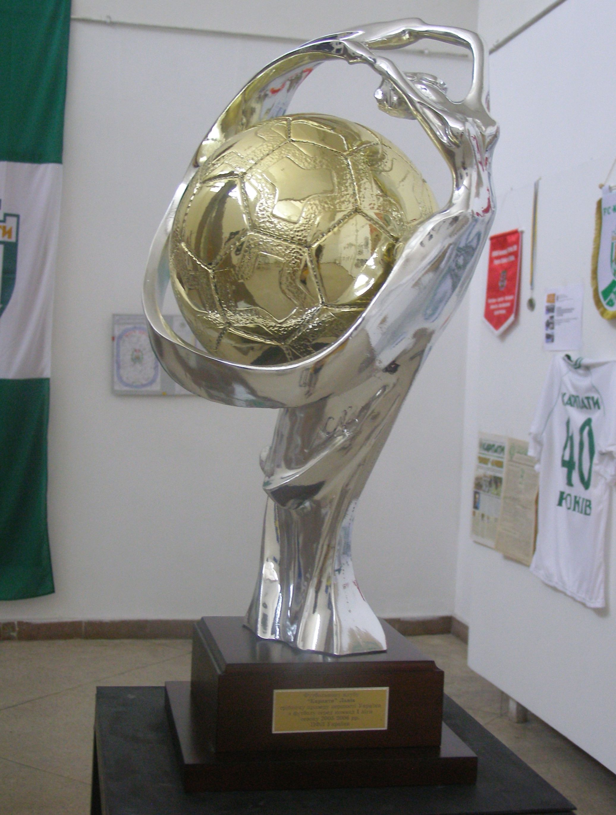 Auszeichnung für Karpaty Lwiw für 2. Platz in der 1. Liga (Saison 2005/06)